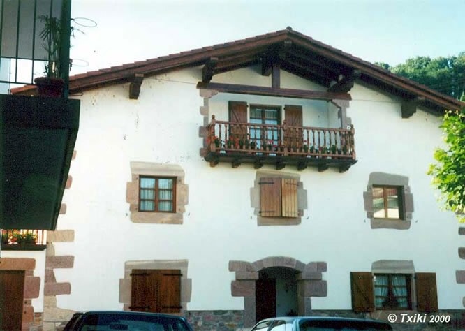 Maison de style navarrais à Sumbilla Pyrénées).